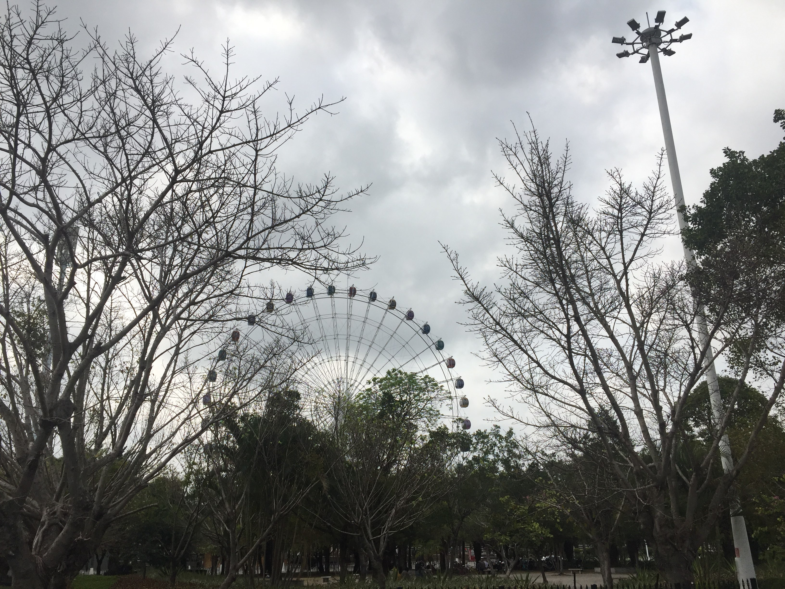 茂名市摩天轮，是广东地区最高的摩天轮